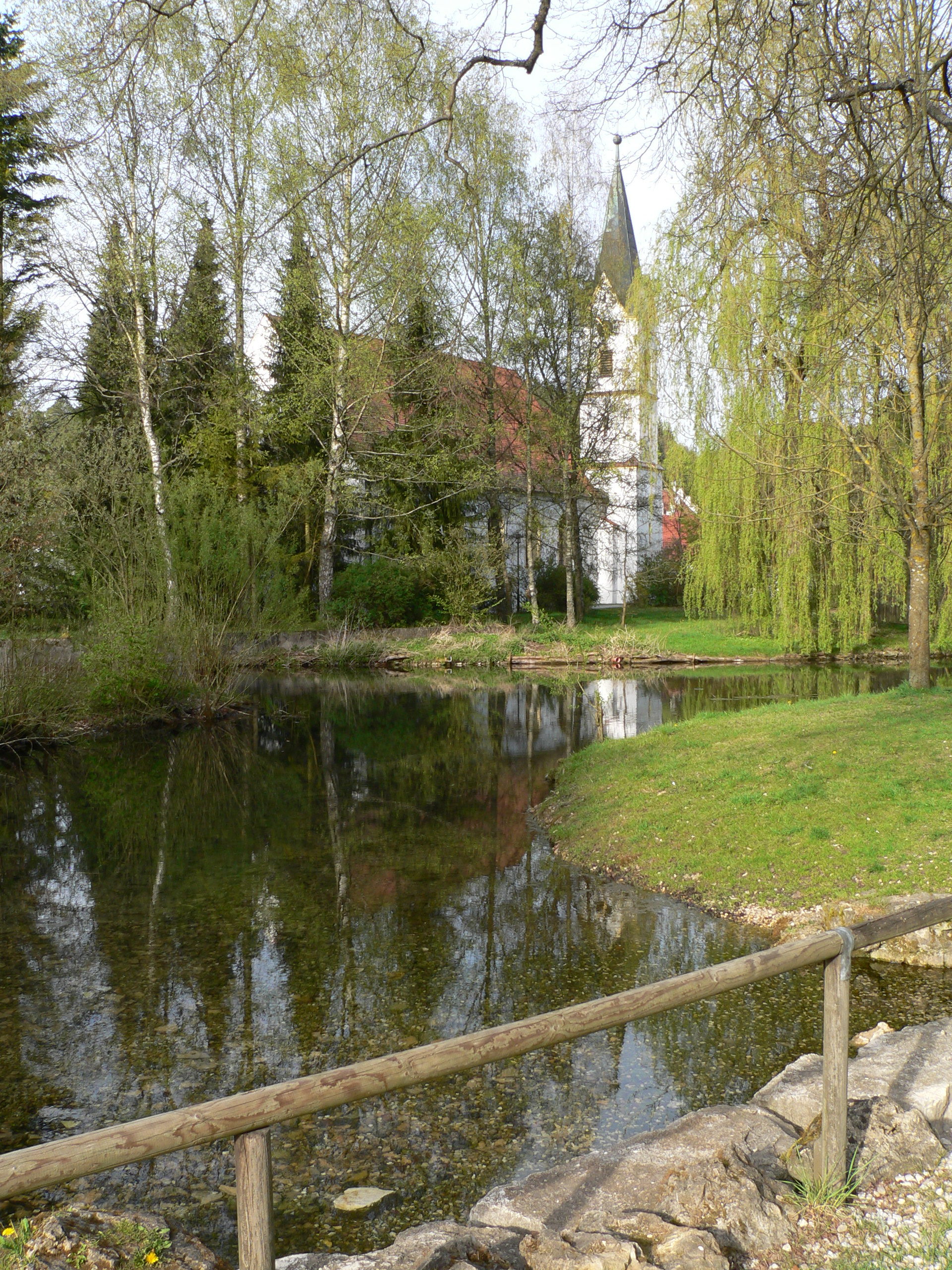 Der Schambachursprung in Schamhaupten. In Hintergrund ist die Kirche zu sehen.